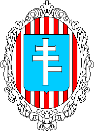 Coat of Arms of Buchach 1920-1939. Герб Бучача (ТЕРНОПІЛЬСЬКА ОБЛАСТЬ) польського (1920-1939рр.) періоду - "Пілава" - в лазуровому полі срібний п'ятираменний хрест.